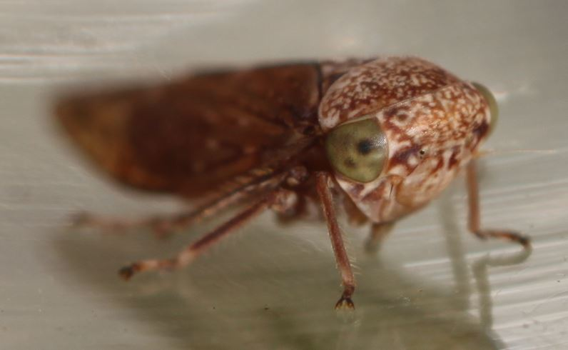 Ribaut-Winkerzikade (Acericerus ribauti), Weibchen, am 25. Oktober 2019 an einer Platane in Walldorf/Baden